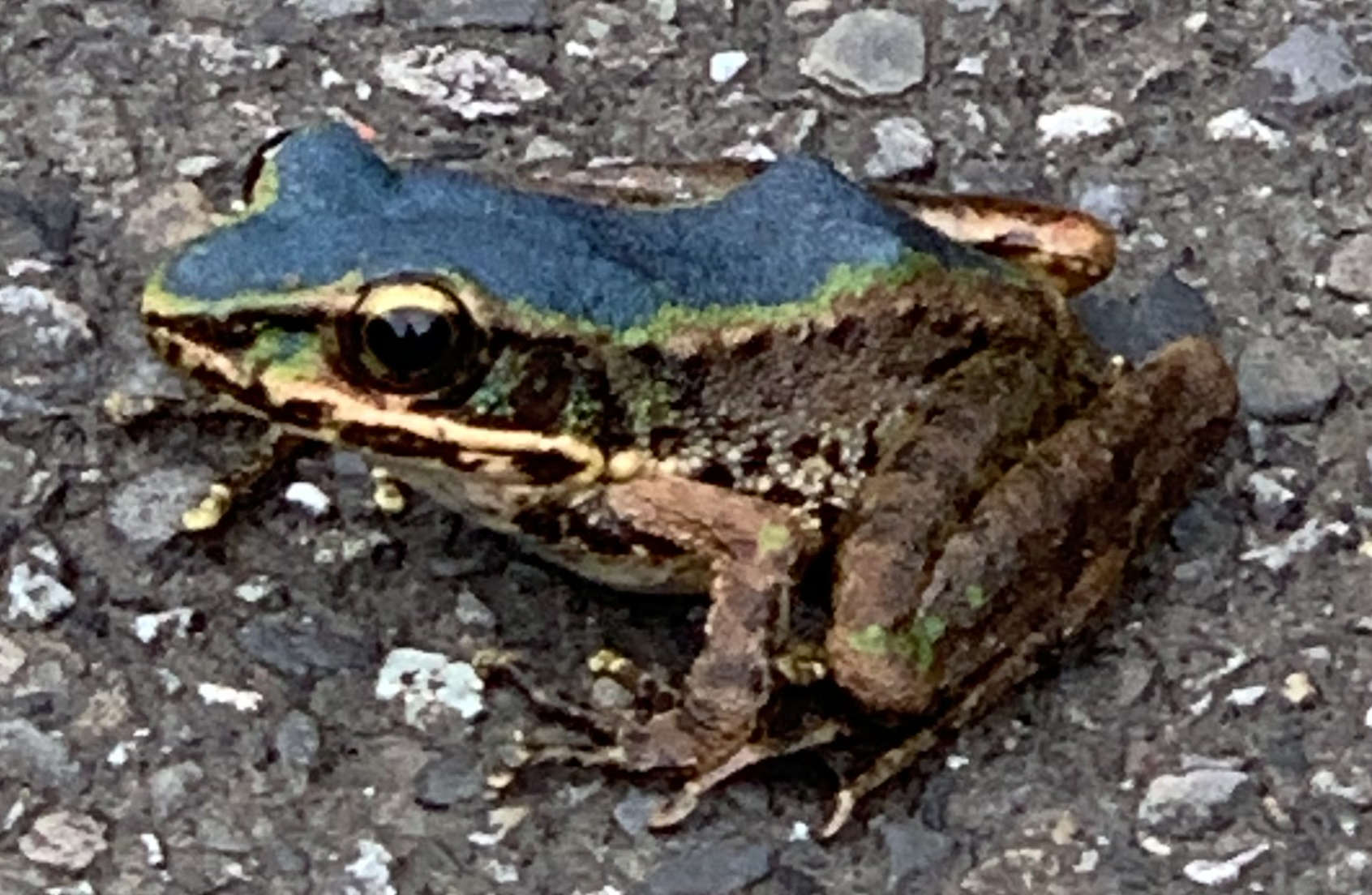 斯文豪氏赤蛙（學名：Odorrana swinhoana），藍背條，拍攝地點：台灣新北市